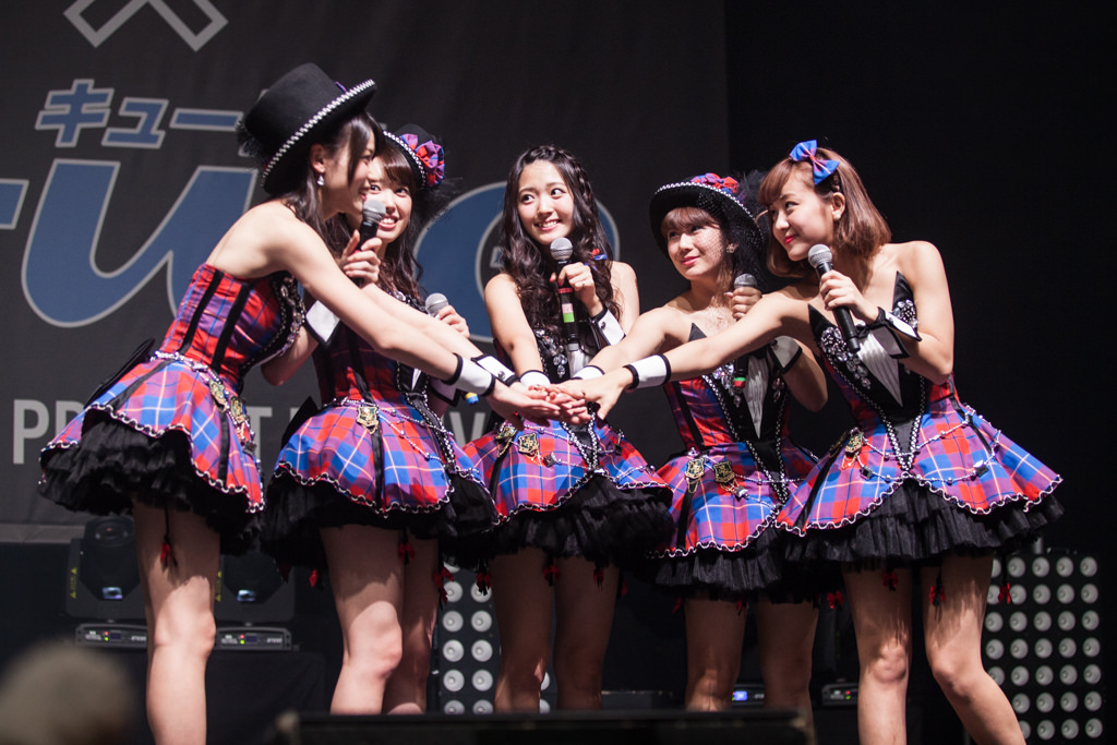 Berryz Kobo x °C-ute